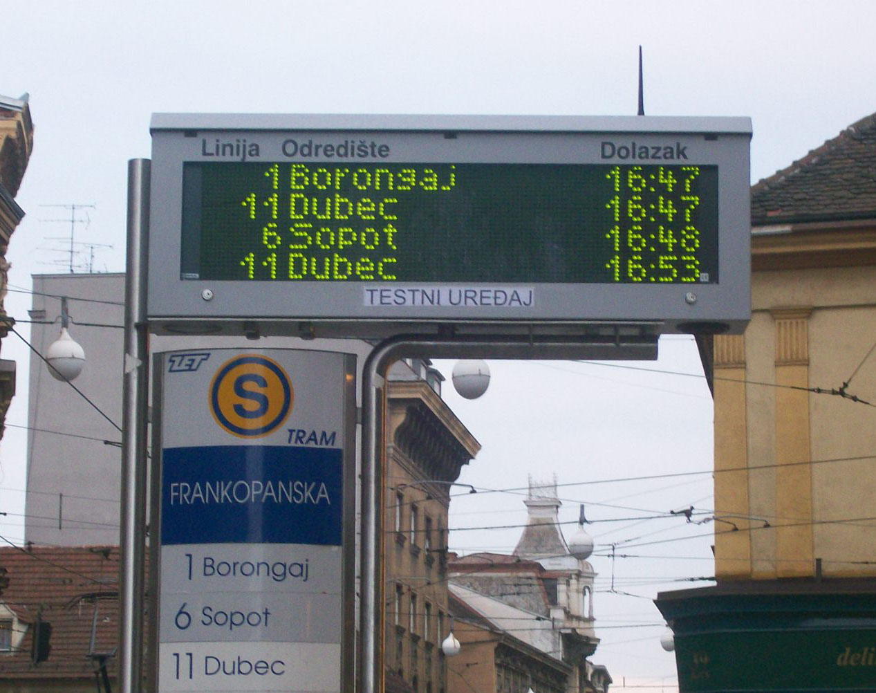 Displej na tramvajskoj stanici, Zagreb